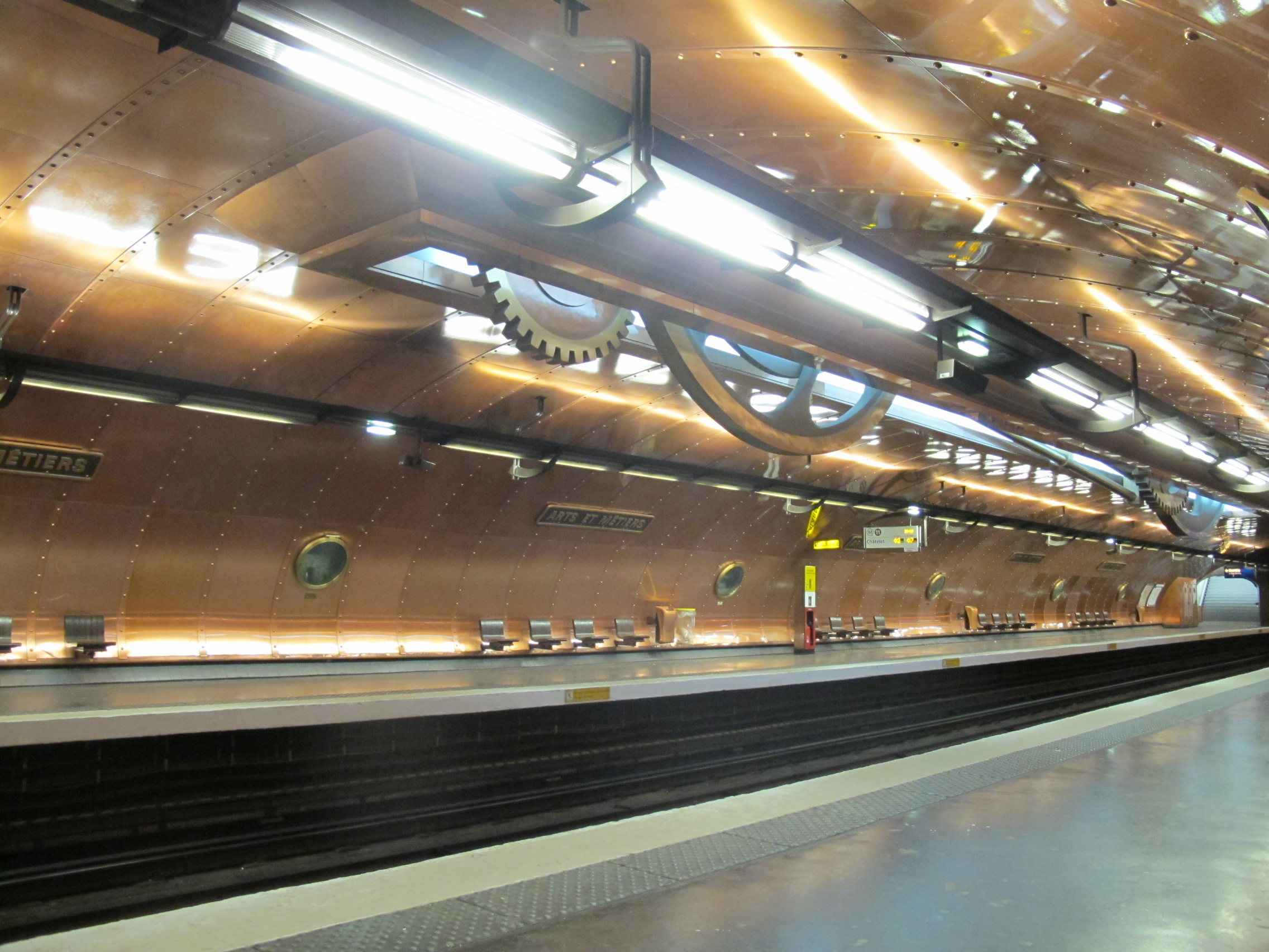 Station Arts et Métiers - ligne 11